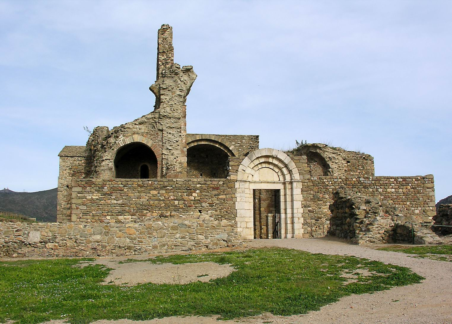 Església del monestir de Santa Maria de Roses (Roses, Alt Empordà)